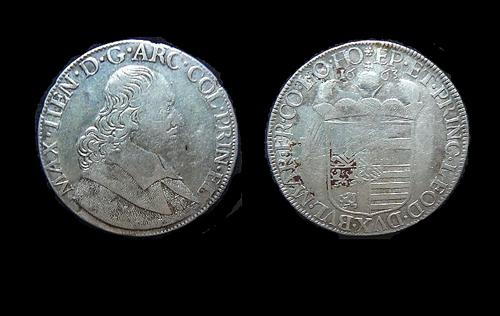 Ducaton d'argent de Maximilien Henri de Bavière. Chestret 639.